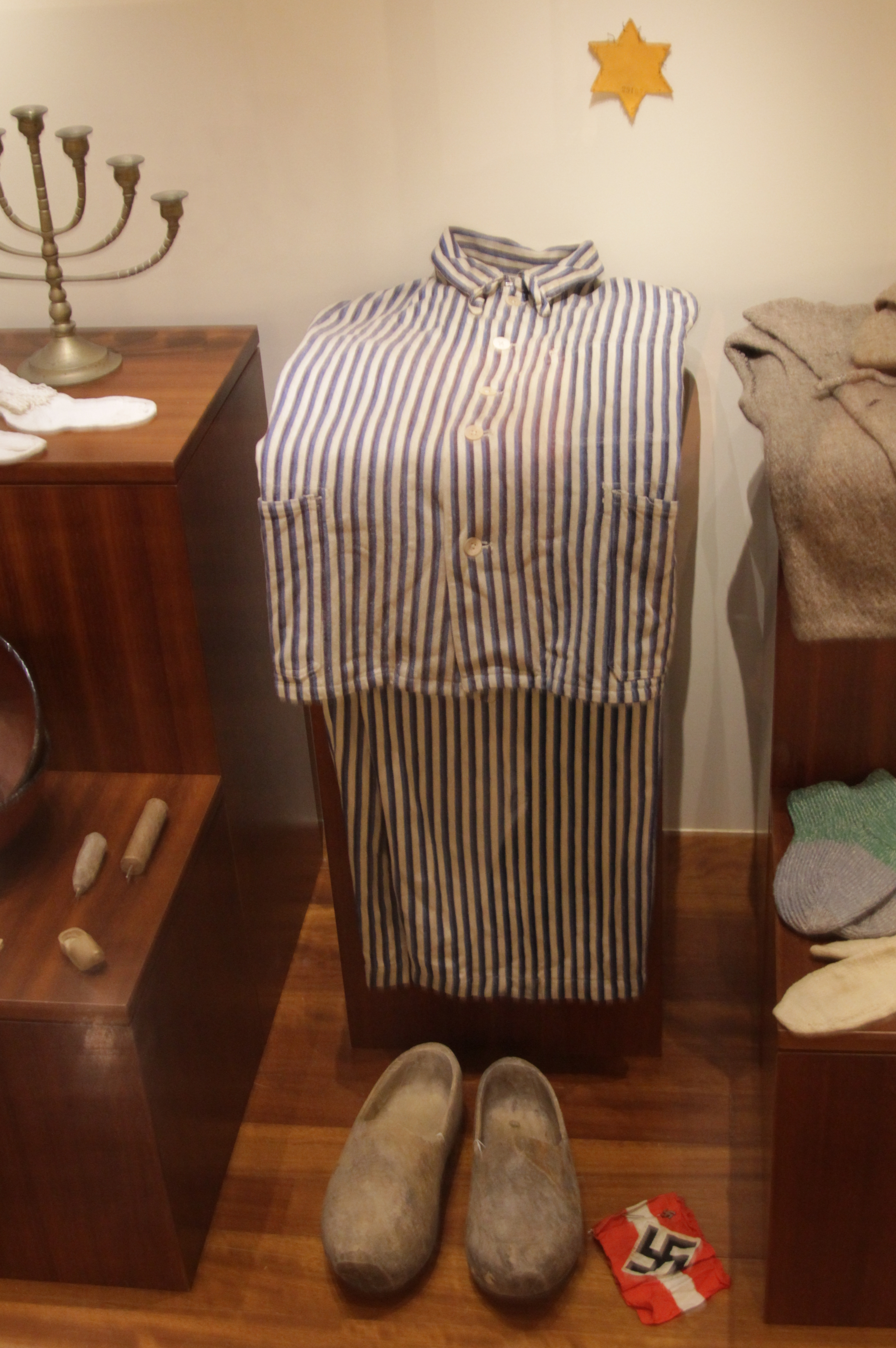 The Jewish Museum of Greece (Athens) --- Το Εβραϊκό Μουσείο της Ελλάδος. (Αθήνα).